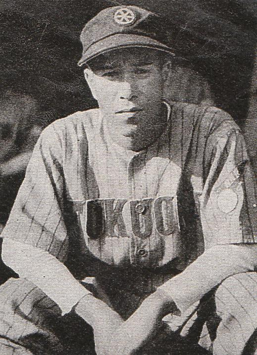 1950年、西鉄クリッパースのプロ野球選手鬼頭政一。